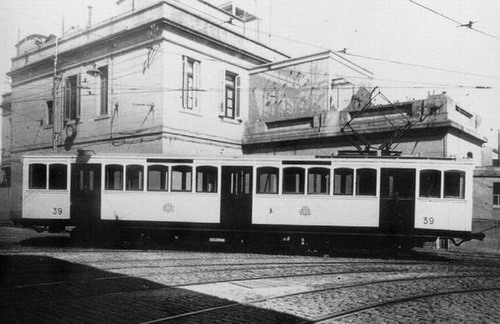 Coche La Brugeoise 39, apenas terminada la reforma.